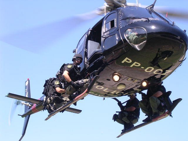 Grupo Especial de Resgate